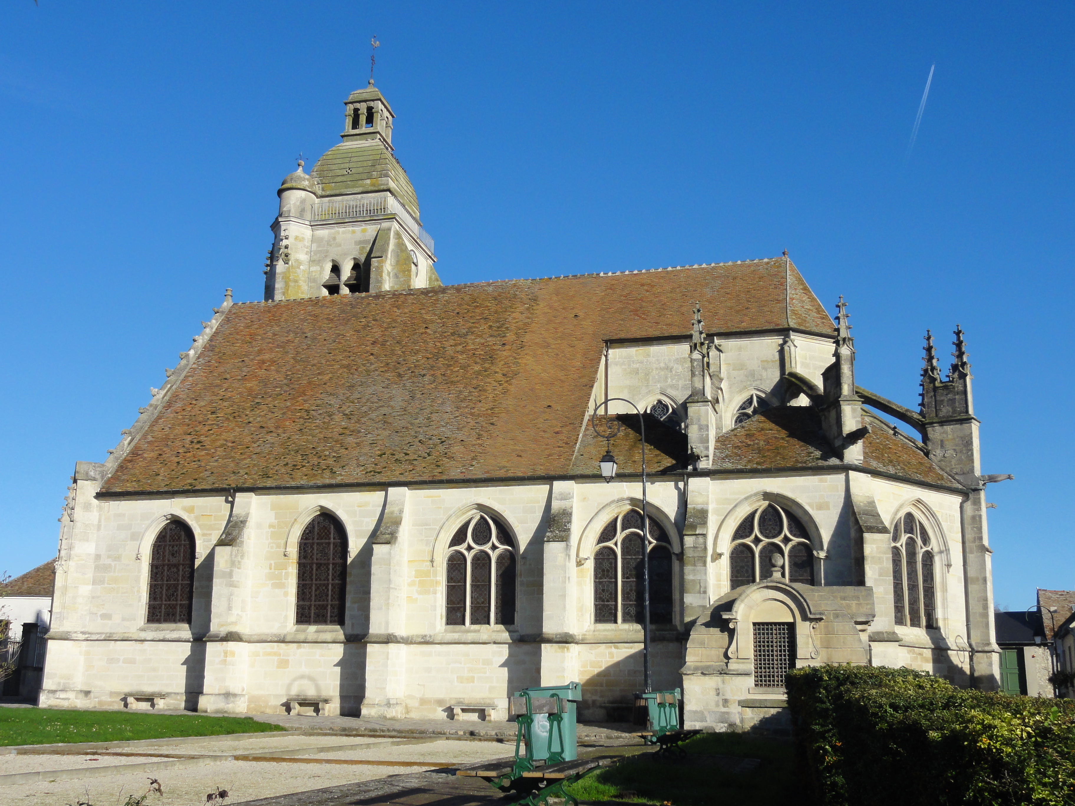 L'élévation méridionale, donnant sur un jardin municipal et le boulodrome.